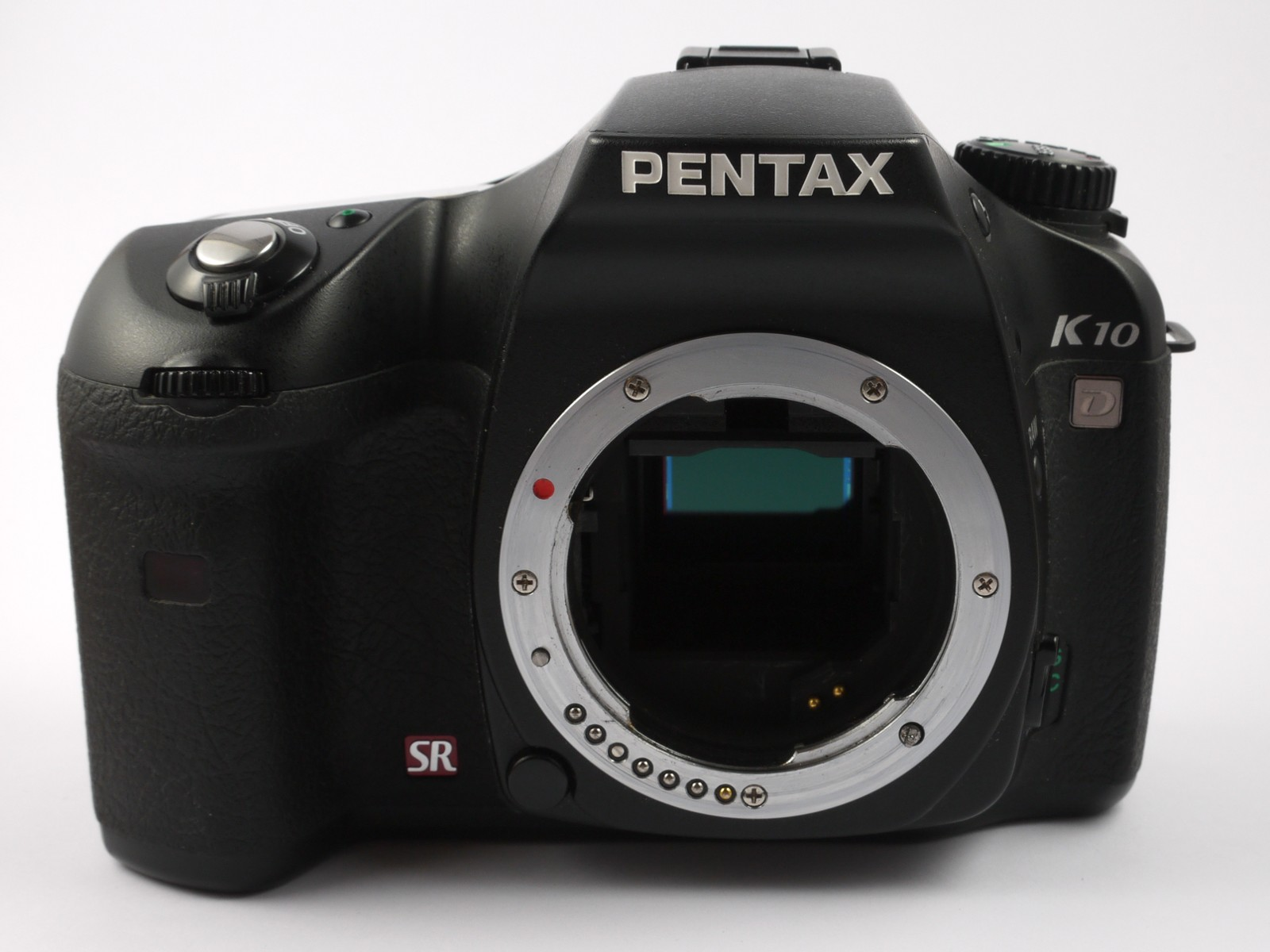 Systemkameran Pentax K10D mot en vit bakgrund.